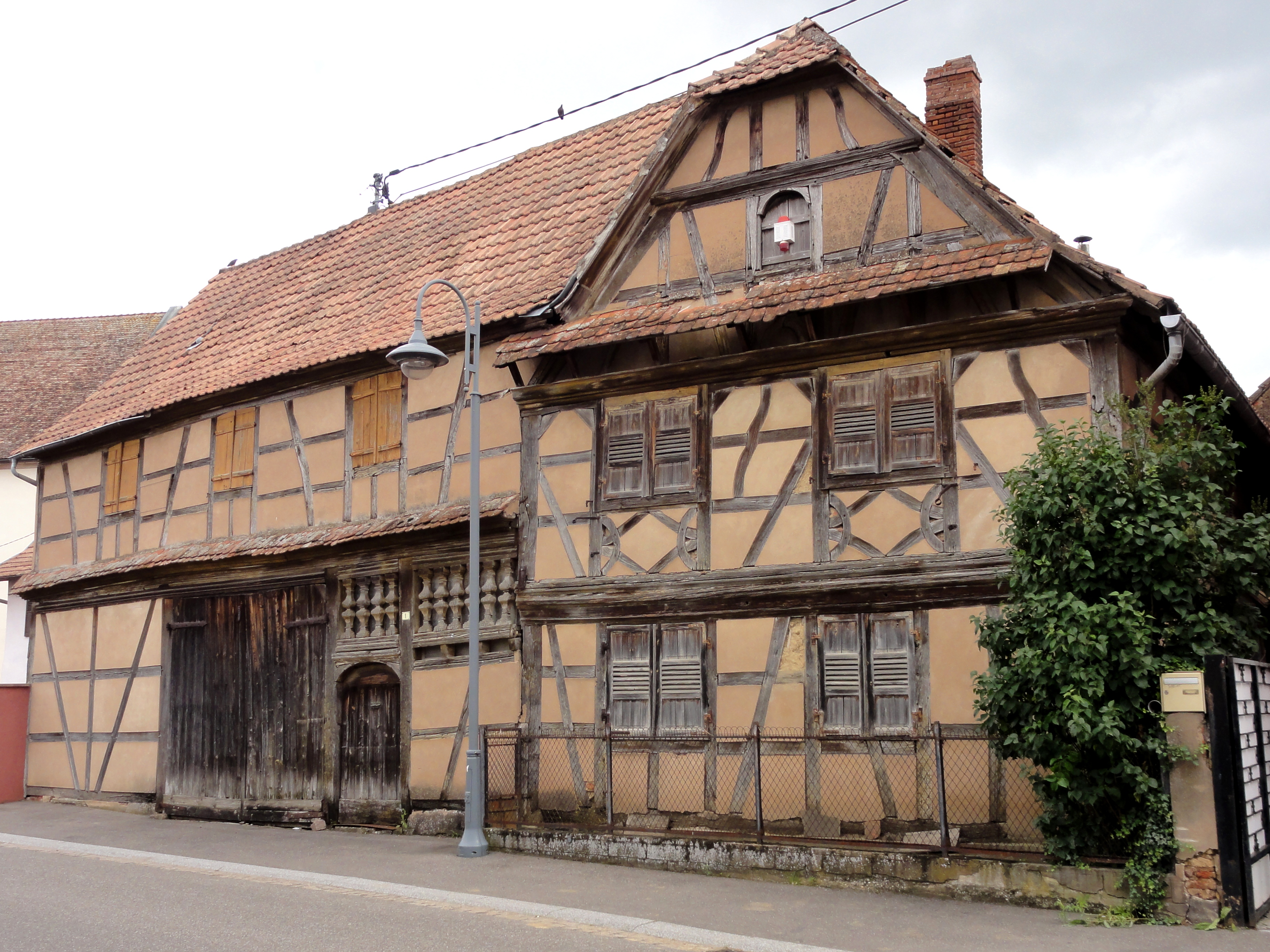 Alsace, Bas-Rhin, Wingersheim, Ferme (XVIIIe), 1 rue de la Victoire. .